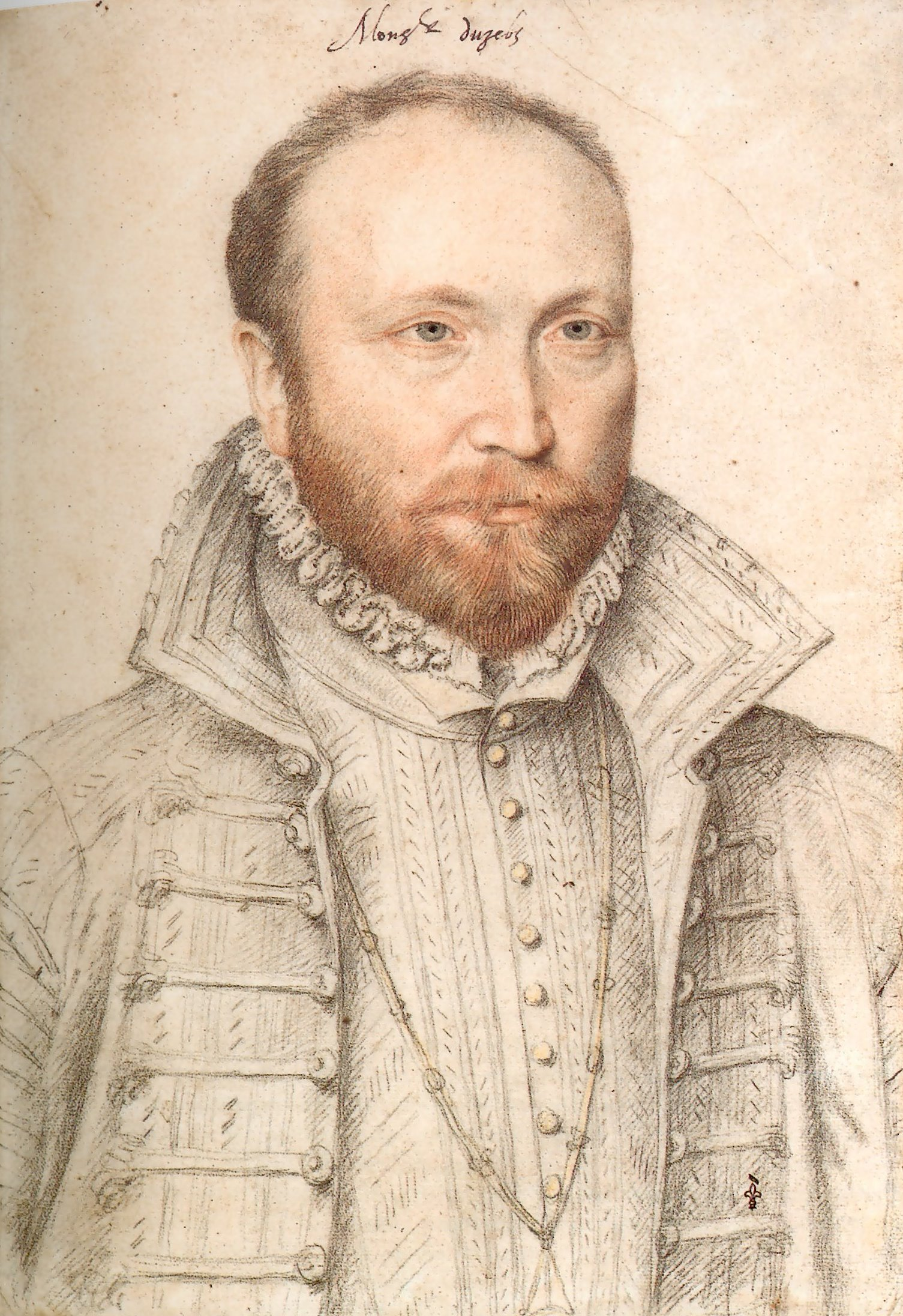 Antoine de Crussol, 1er duc d'Uzès (1528 - 1573), par François Clouet - Chantilly, musée Condé